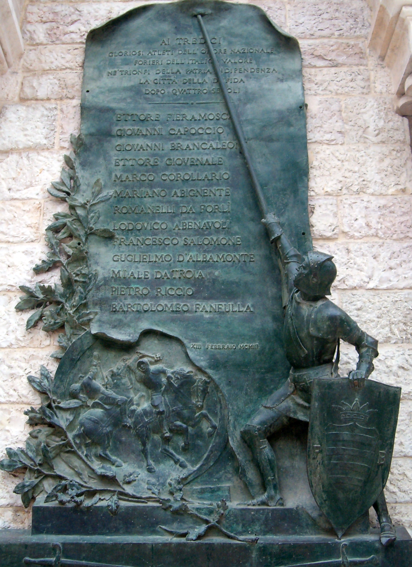 Barletta (Puglia, Italy). Monumento alla Disfida di Barletta (particolare).